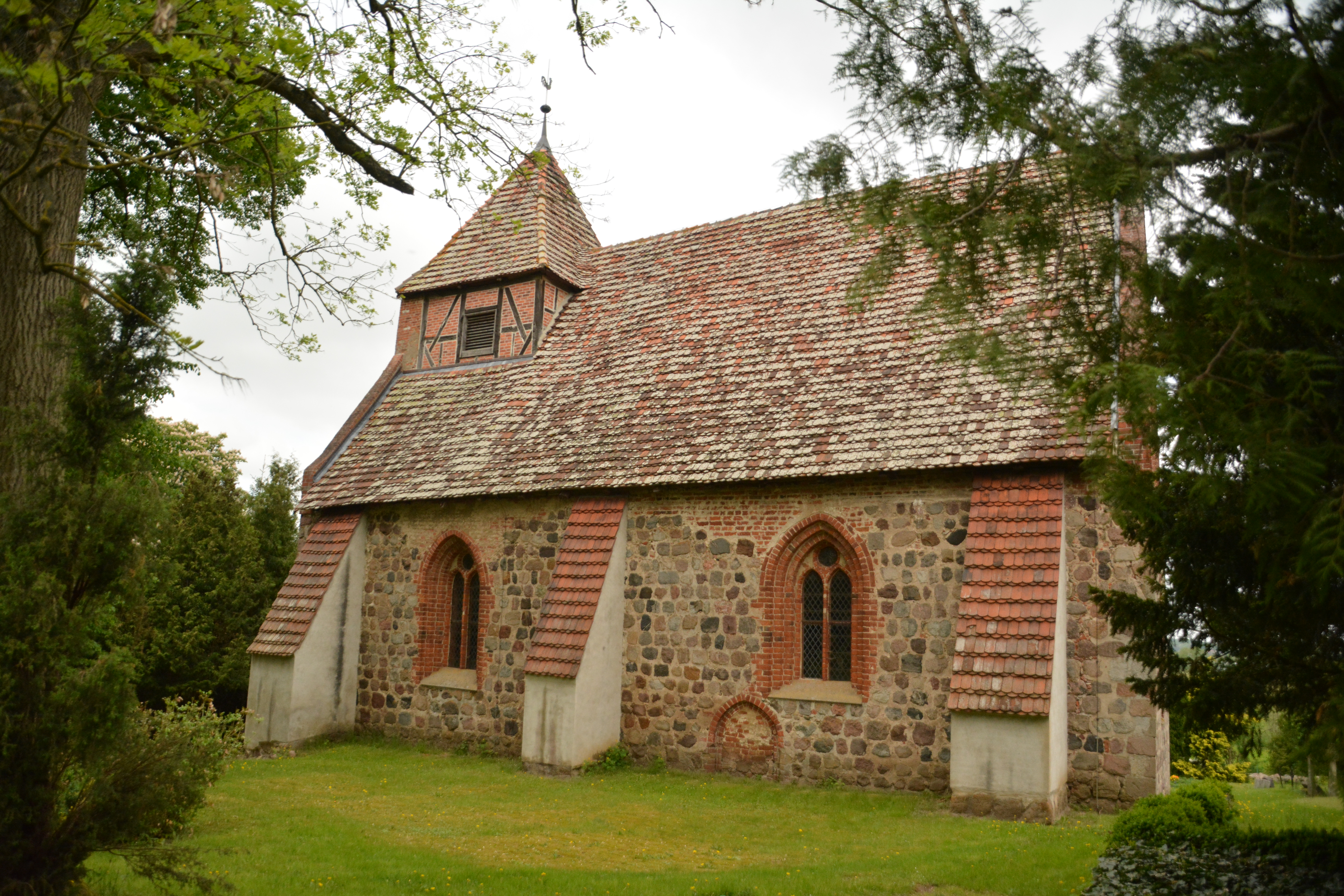 Dorfkirche Badendiek Südostansicht